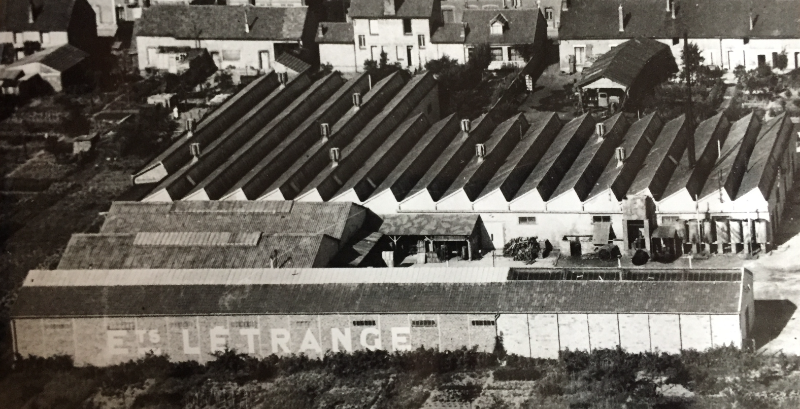 Usine des Établissements Létrange à Montargis, France